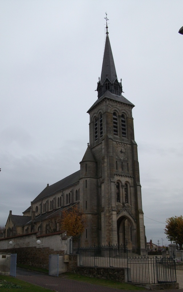 église Saint Memmie à Saint-Memmie, portail ouest.